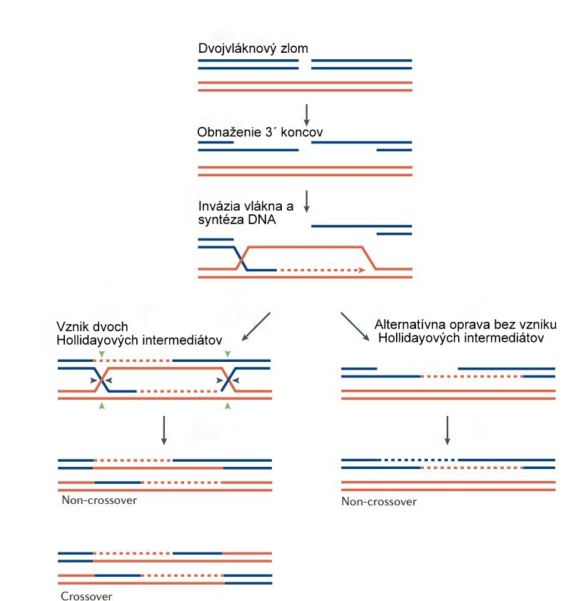 Oprava DNA, rekombinácia.